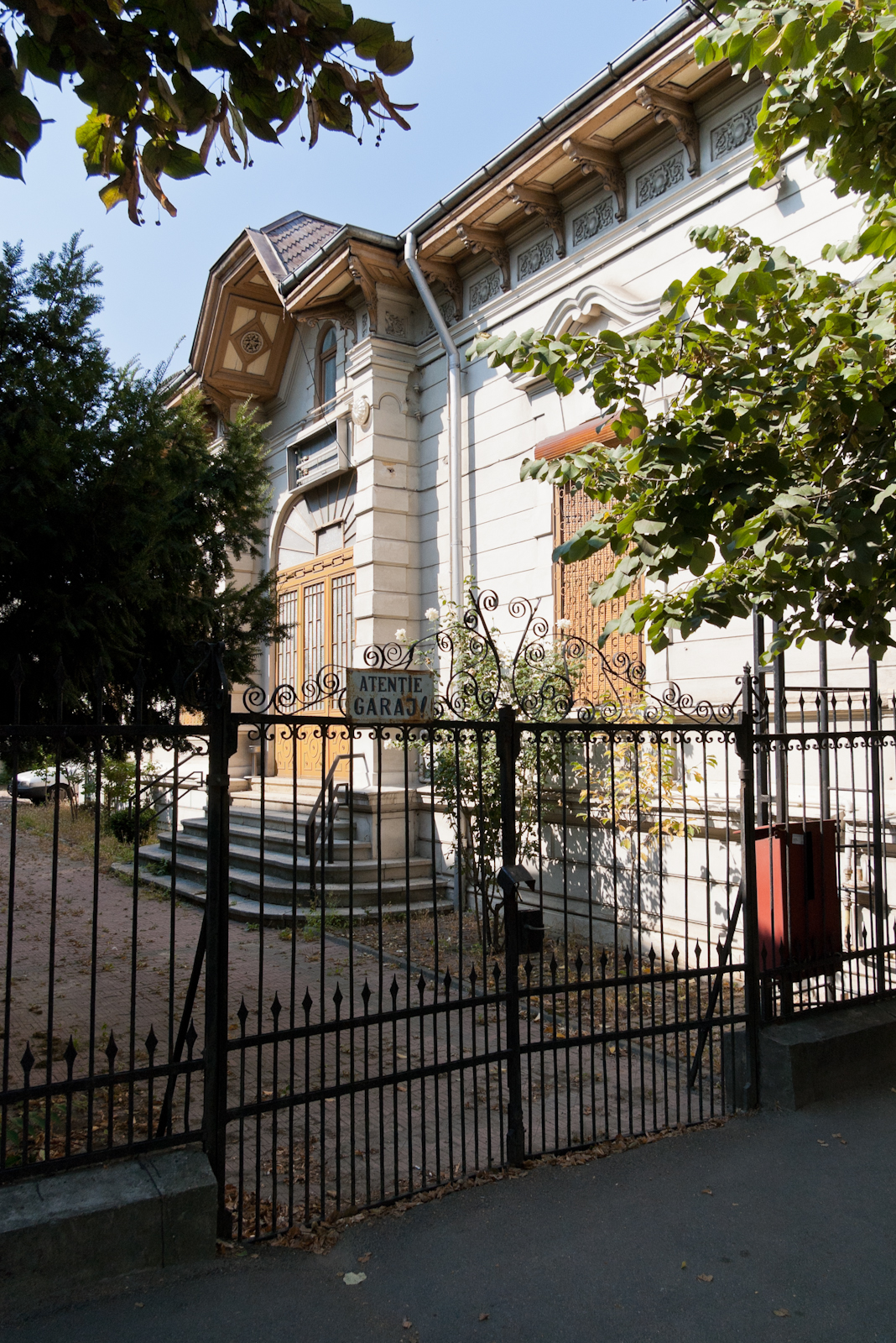 Fotografia prezinta casa Drujan, de pe bd. Republicii 94.